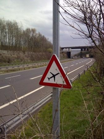 Fréiert Schëld A,17 "Aérodrome"; ofgeschaaft duerch de règlement grand-ducal vum 23. Mee 2012.